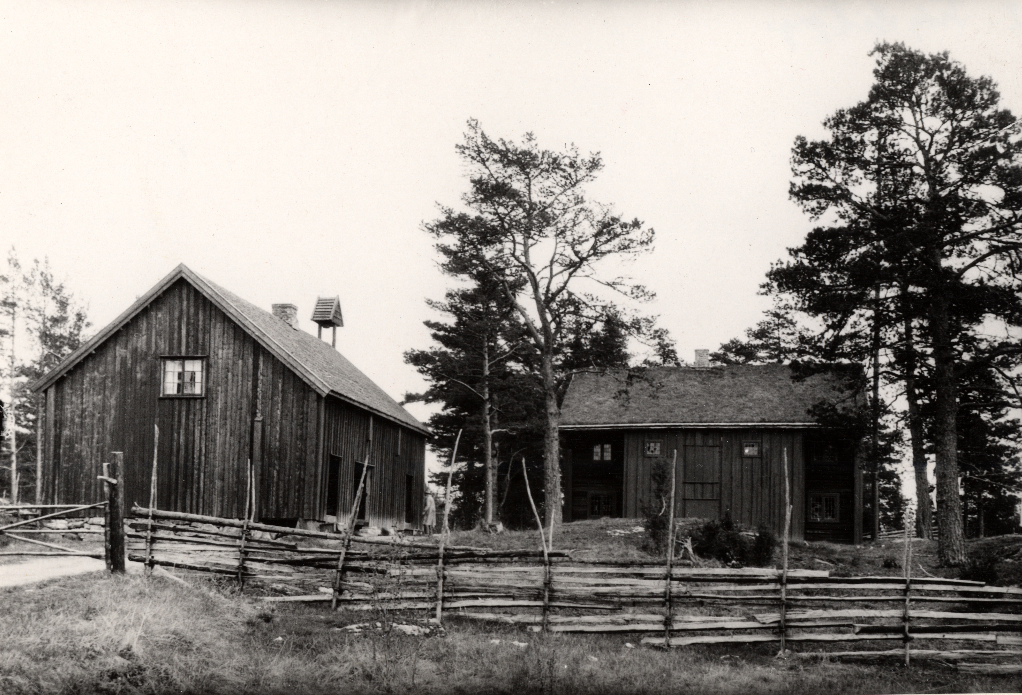 Trøgstad prestegård i Trøgstad, Østfold Flyttet til Trøgstad Bygdemuseum 1934 This image on crowdsourcing geotagging platform Fotodugnad